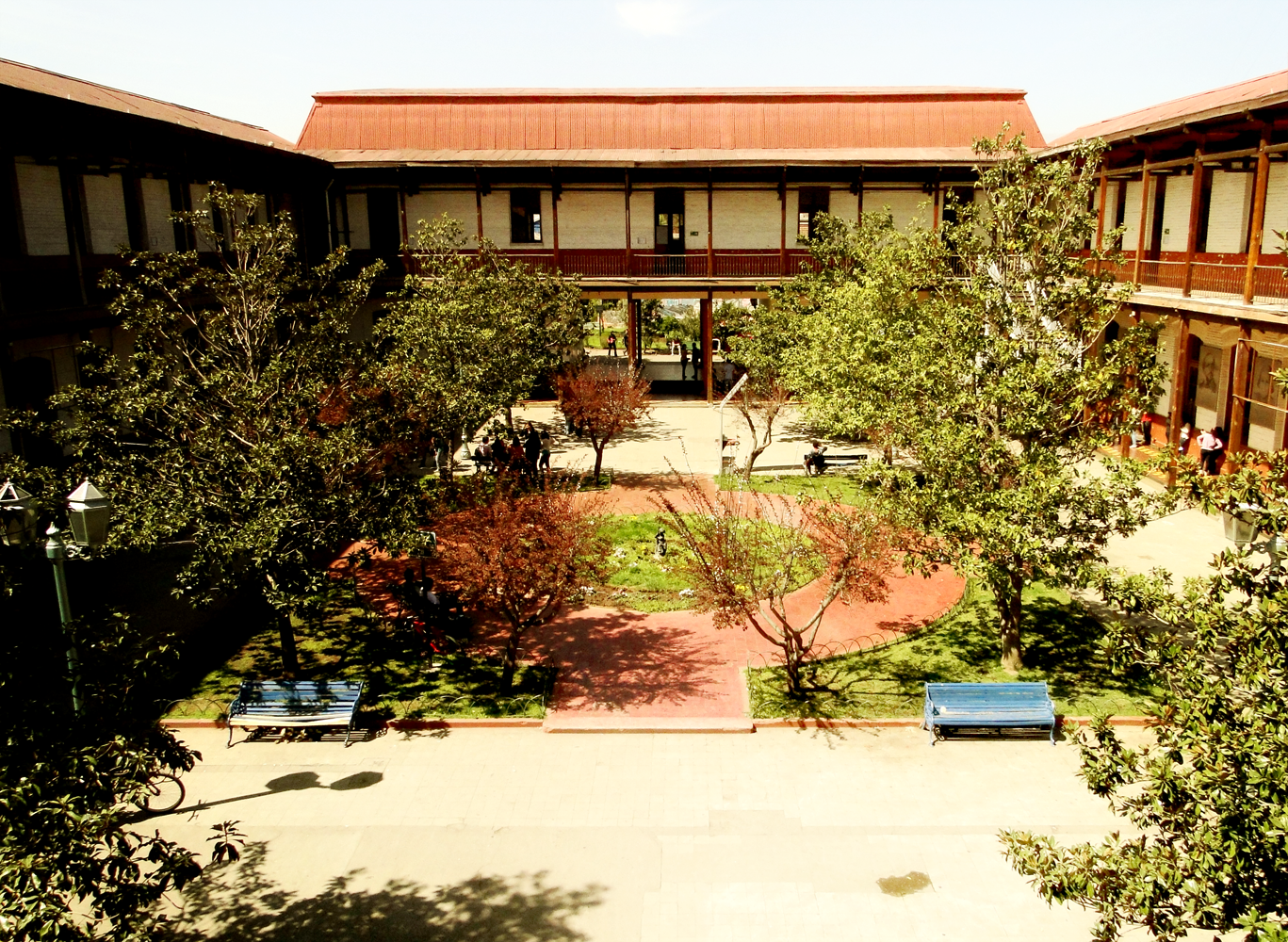 Escuela de Artes y Oficios This is a photo of a national monument in Chile: 868